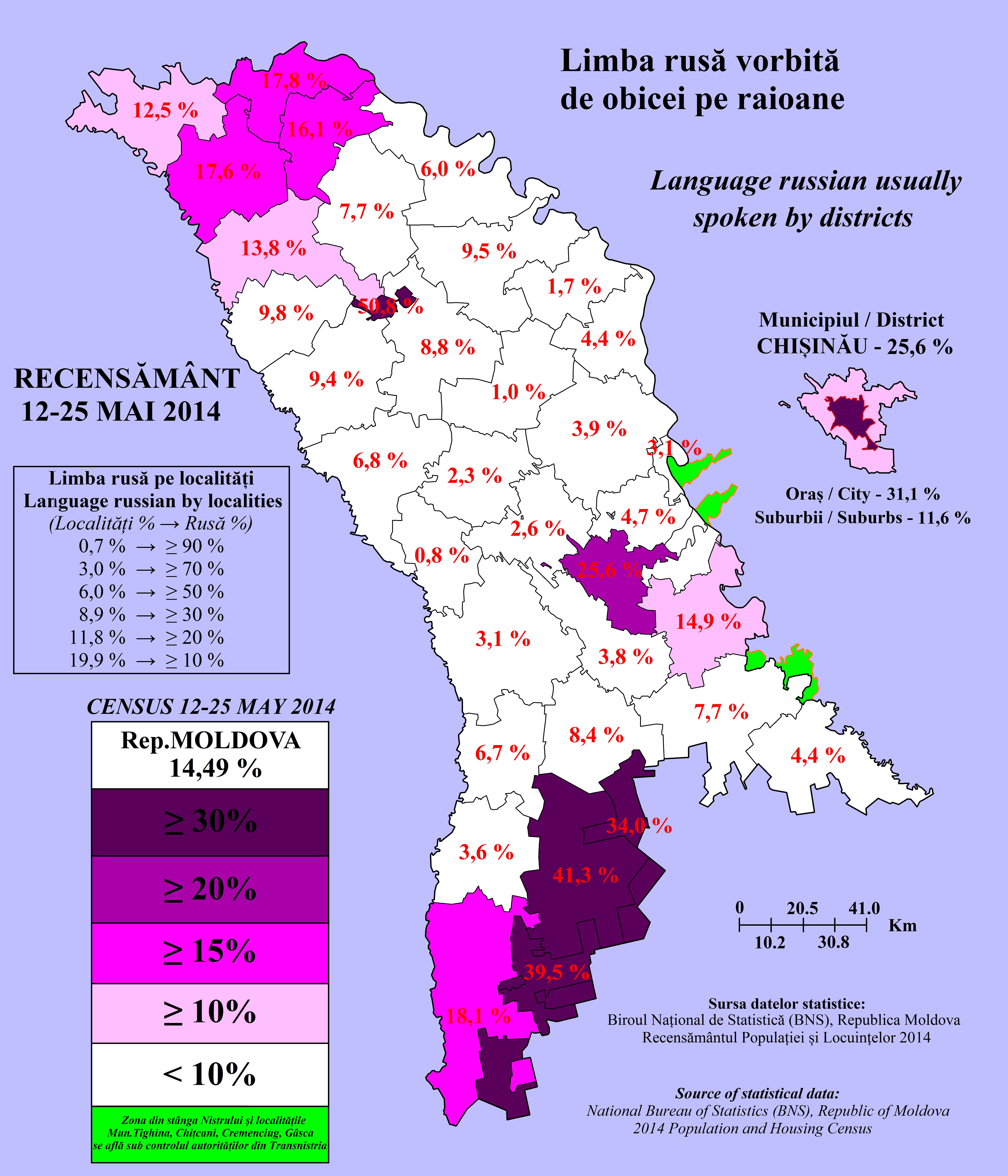 Limba rusă vorbită de obicei pe raioane în Rep.Moldova (2014)